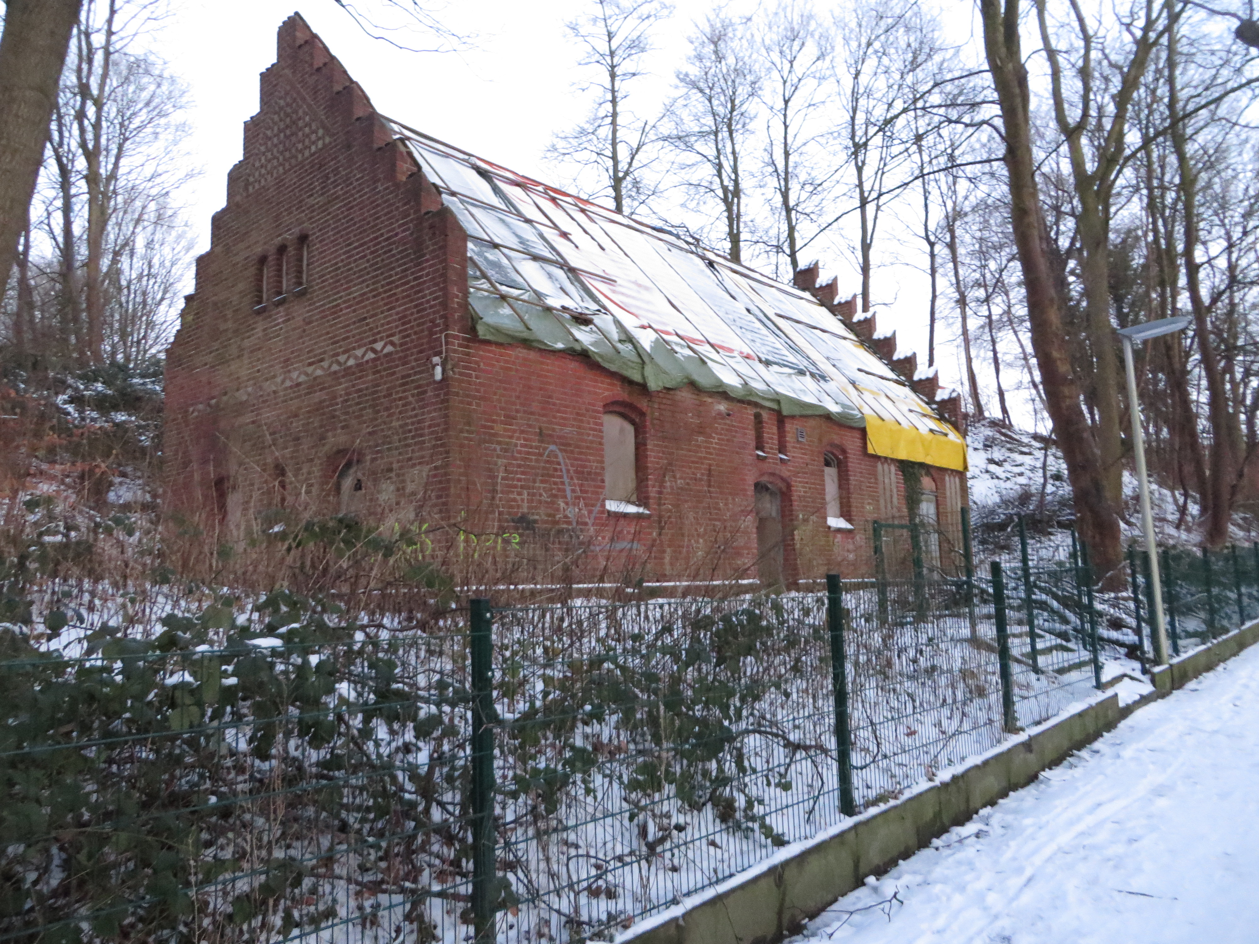 Leichenhaus vom Fördewald-Wanderweg aus